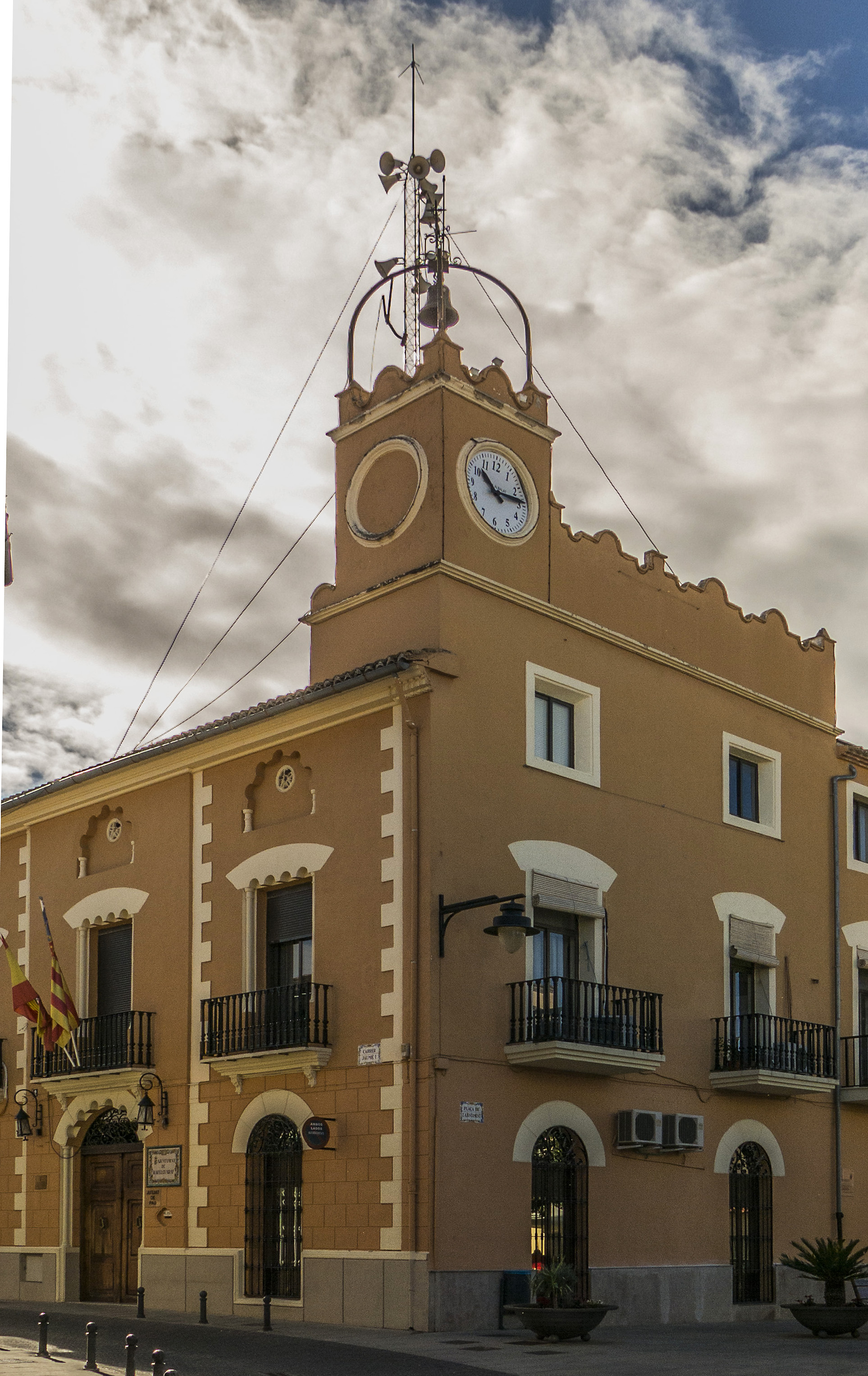 Rafelguaraf és un municipi del País Valencià situat a la comarca de la Ribera Alta.